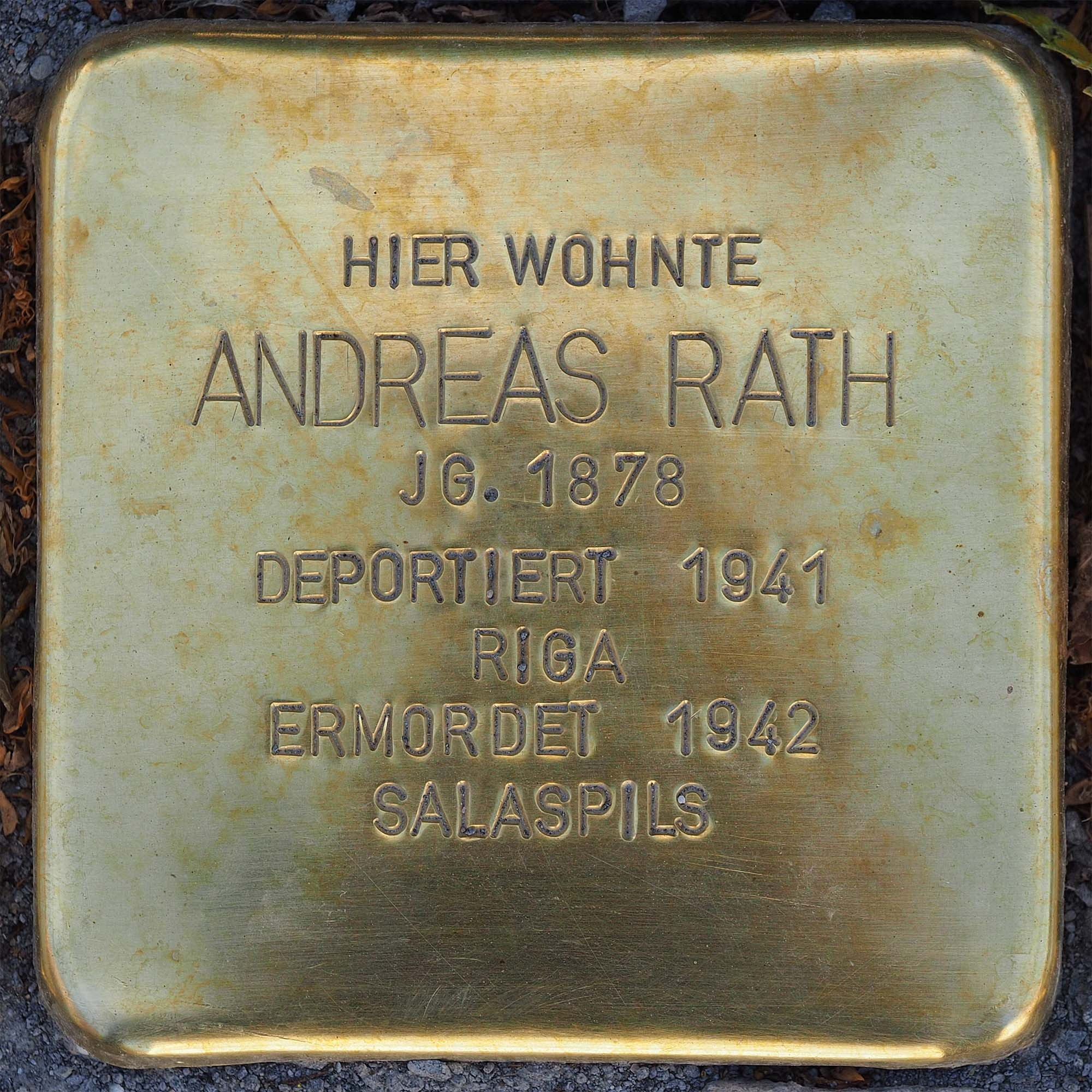 Stolpersteine Kempen: Rath, Andreas